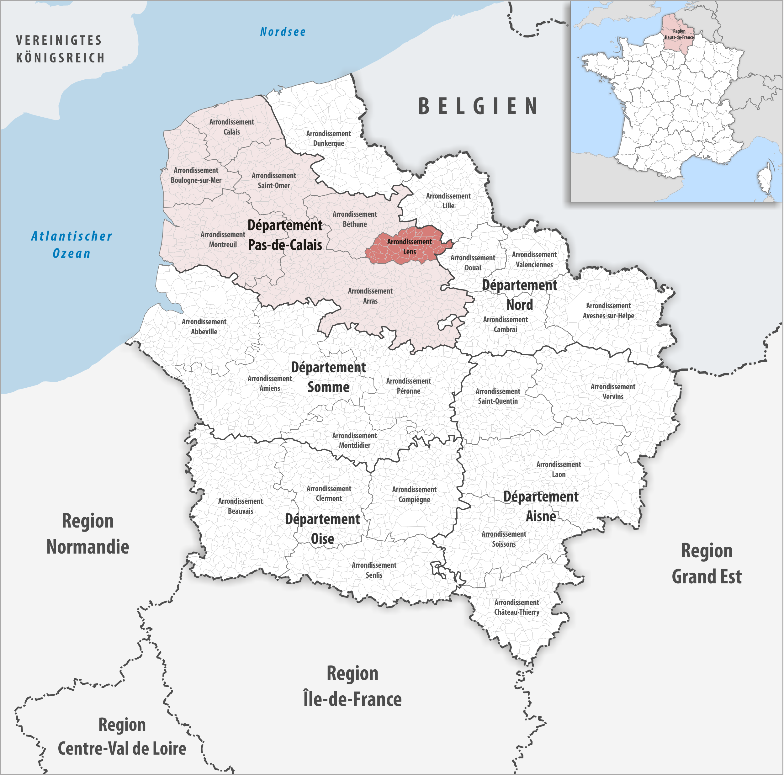 Lage des Arrondissements Lens